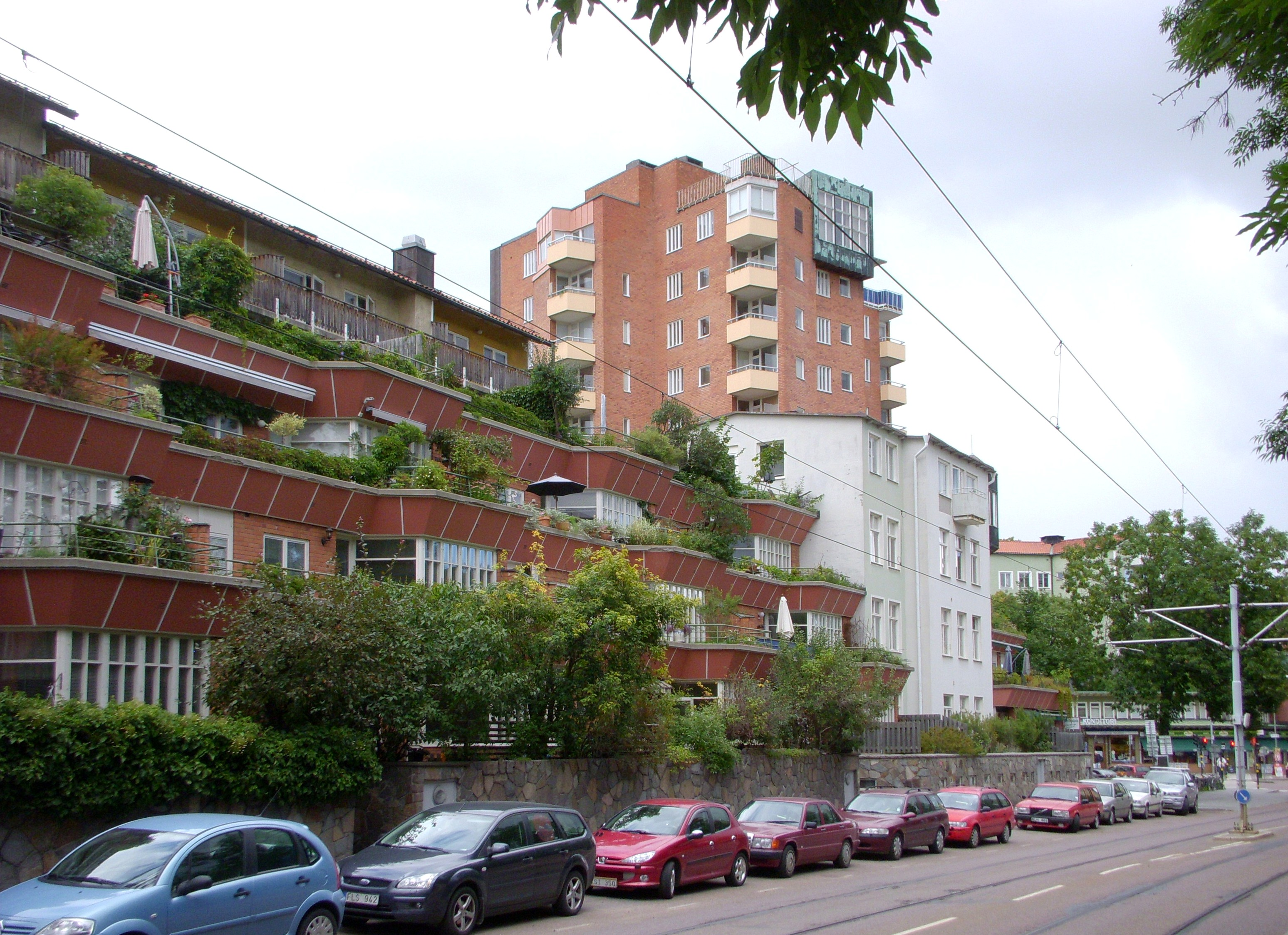 Terrasshusen och Gajonshuset längs Gröndalsvägen i Gröndal